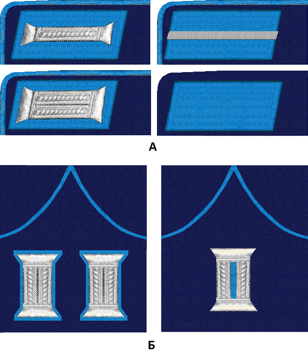 Милиция 43